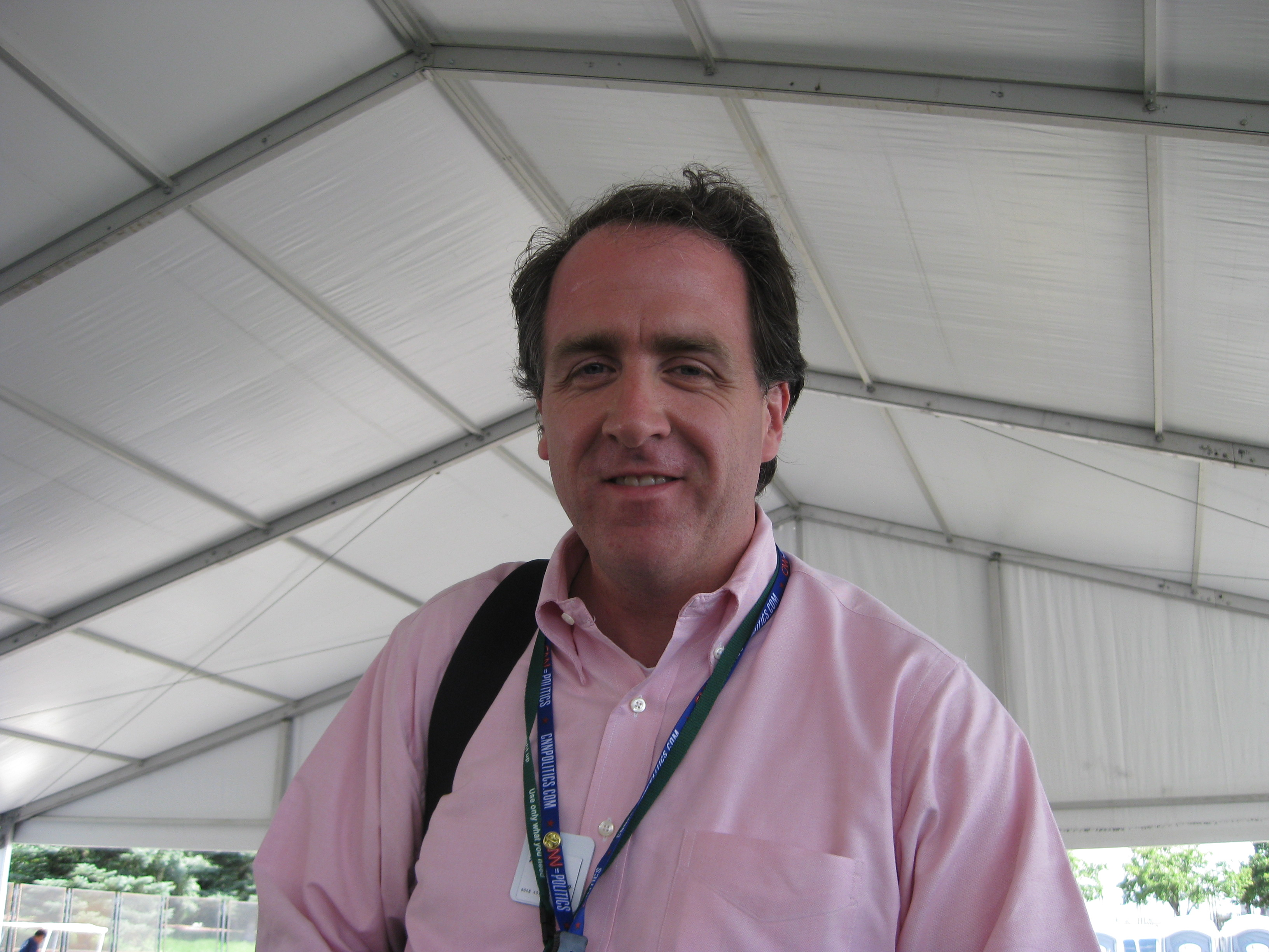 Taegan Goddard